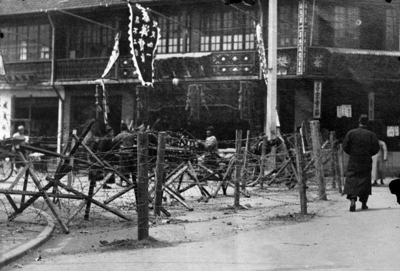 Die Kritische Lage in Changhai ! Drahtverhaue an der Grenze des Europäerviertels in Changhai zur Sicherung gegen Aufstände. Information added by Wikimedia users.